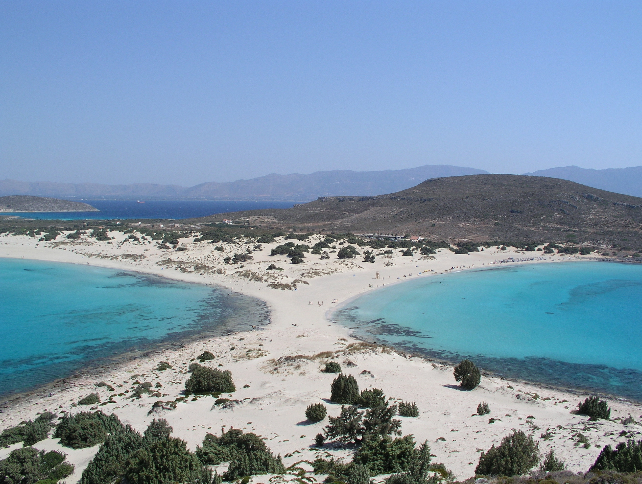 Elafonissos - Strand von Simos